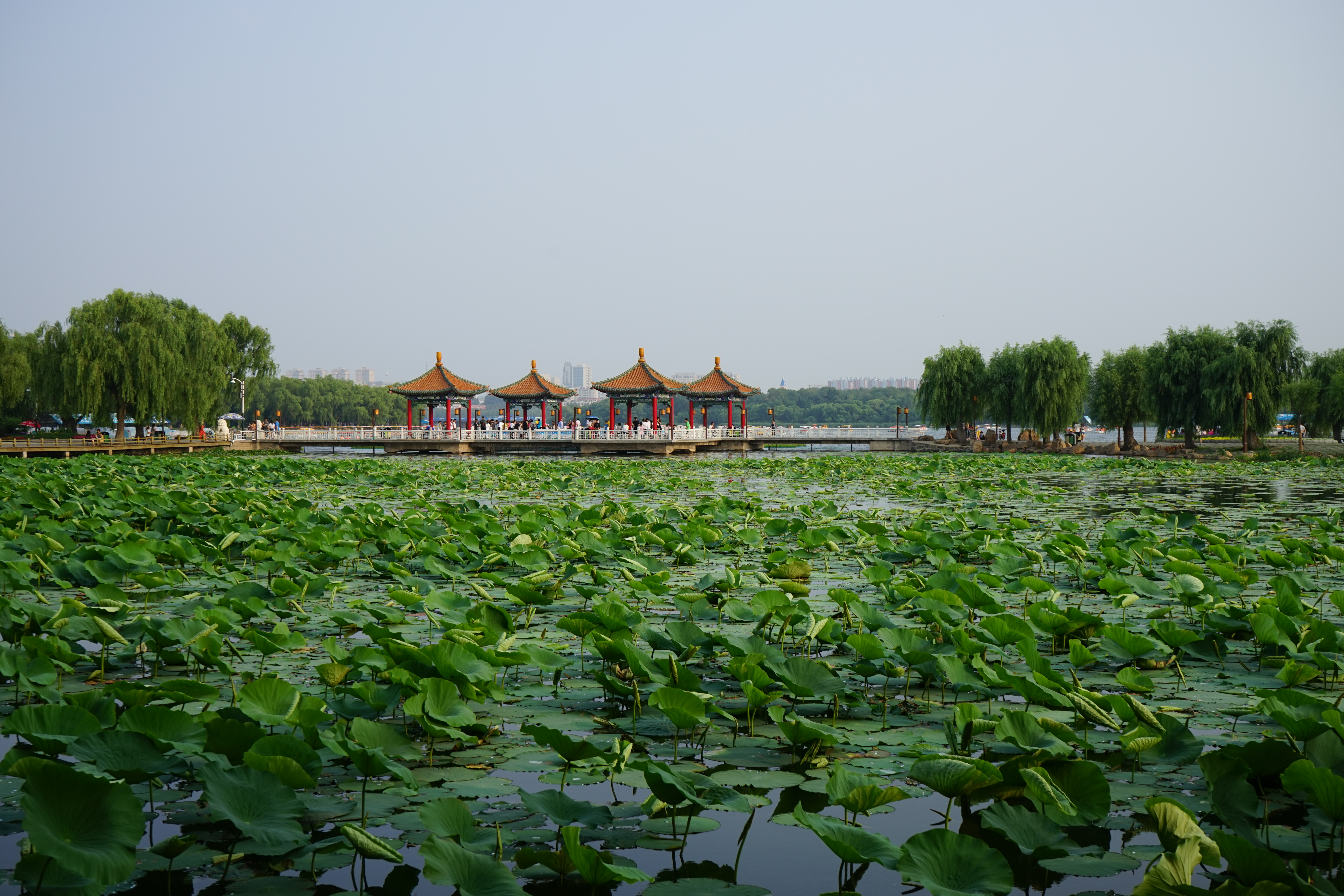 中文（中国大陆）: 南湖公园 2017年夏